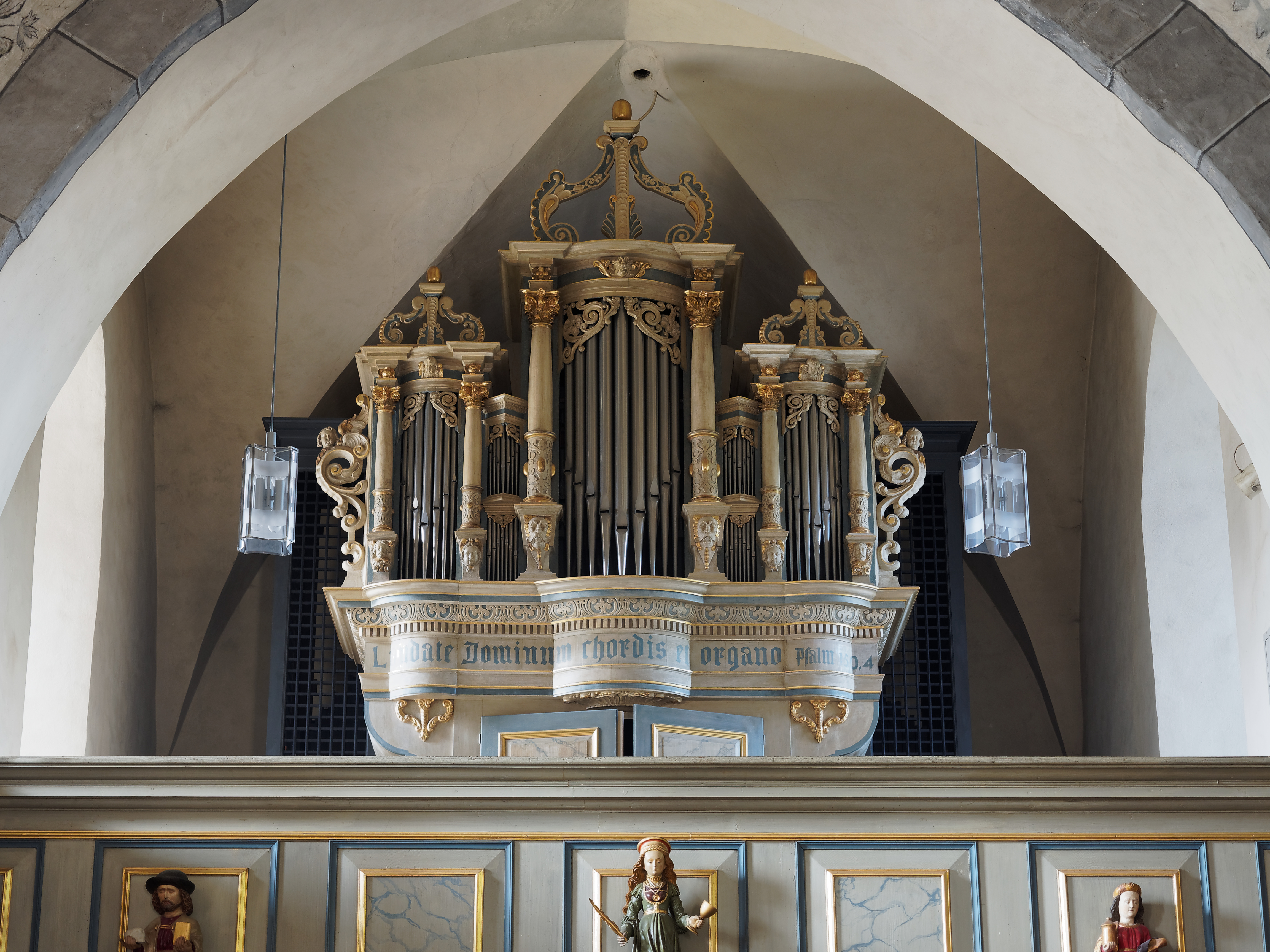 Orgel in der Kirche St. Heribert in Hallenberg, Sauerland This is a photograph of an architectural monument.